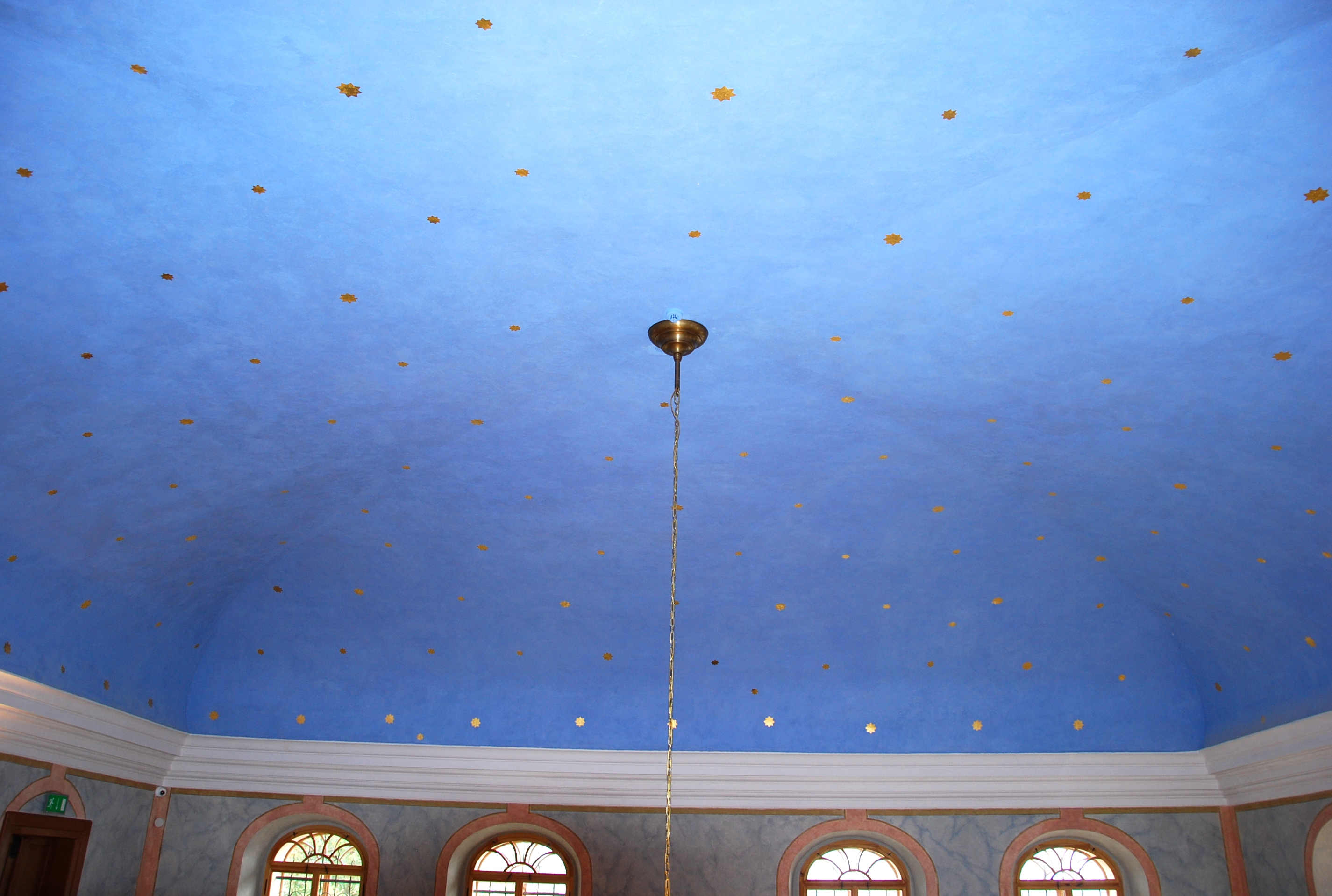 Synagoga, Na potoce 140/8, Brandýs nad Labem. strop